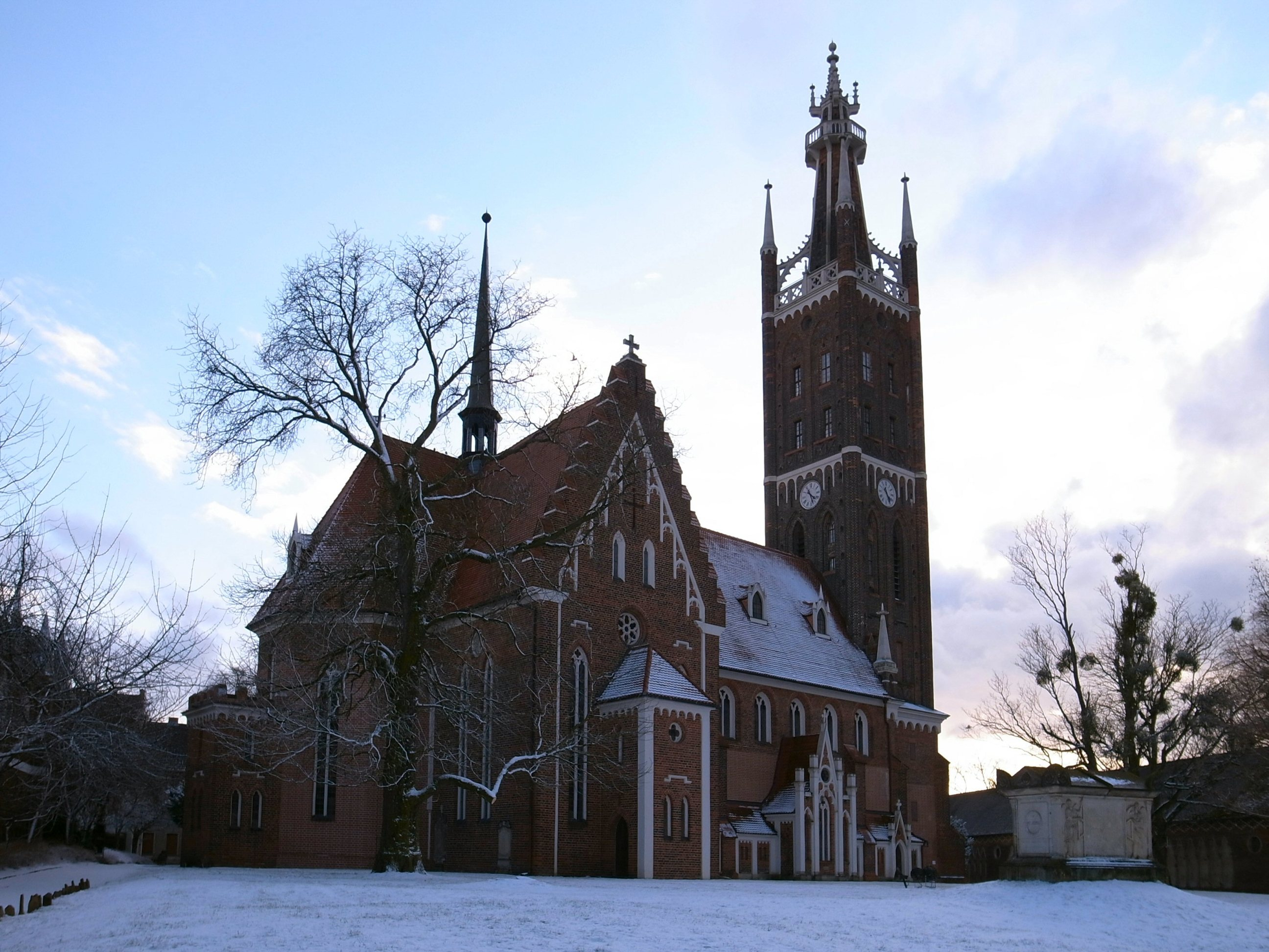 Wörlitz,St.-Petri-Kirche und Bibelturm (der 66 m hohe Kirchturm, Quelle